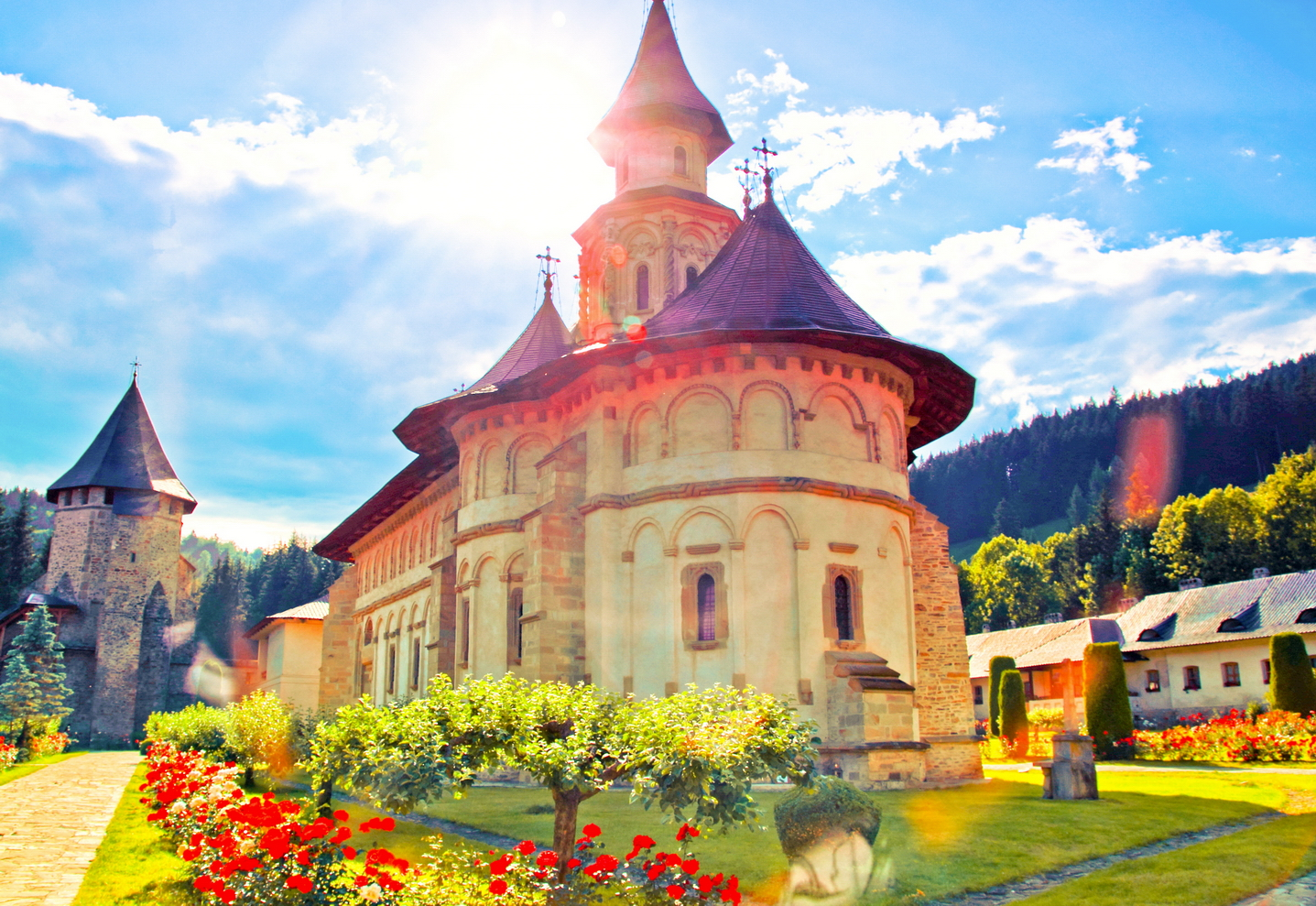 În soarele ce merge spre asfințit împrejurimile Mănăstirii Putna apar drept Raiul pe pământ.